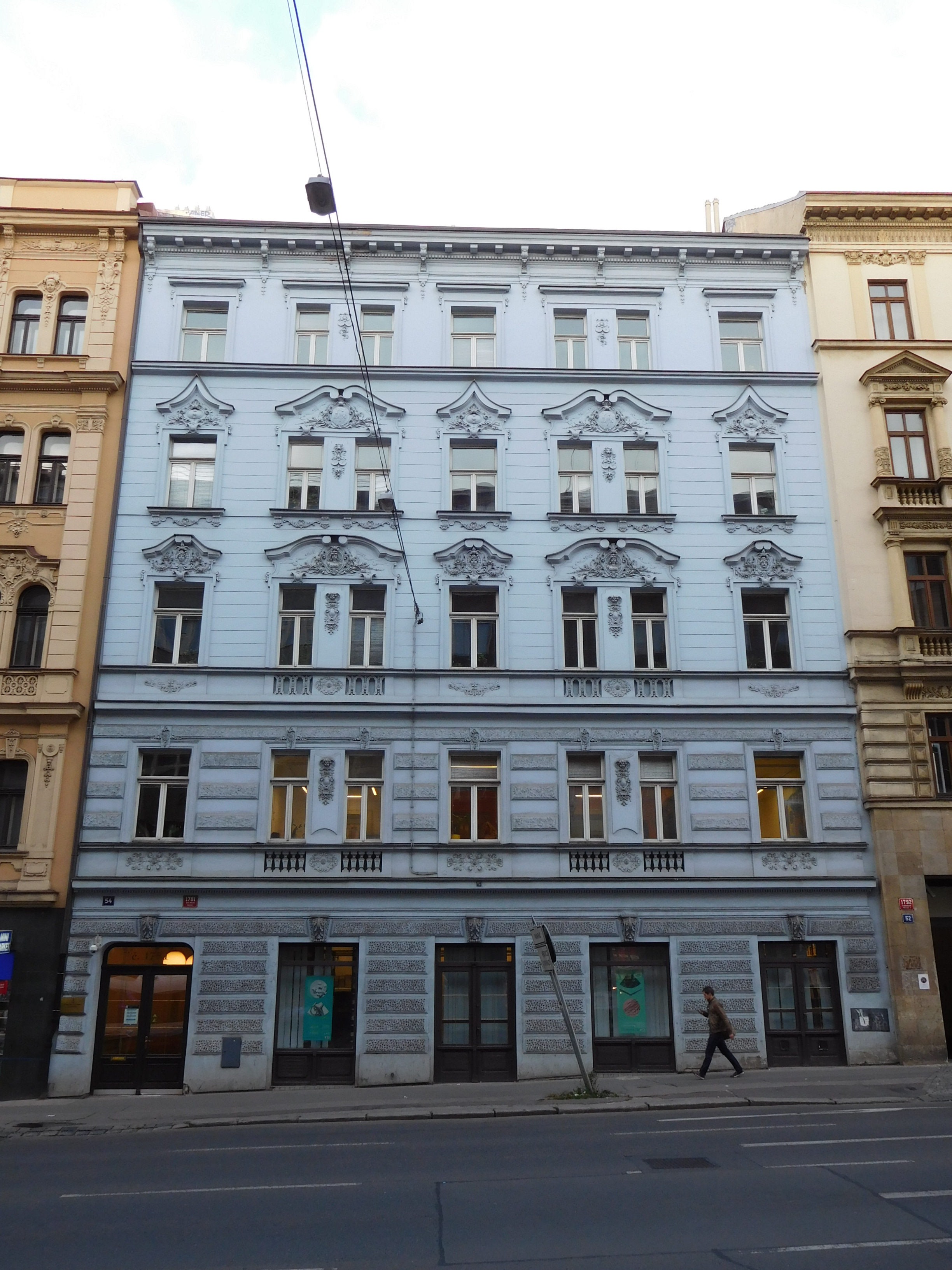 Praha - Nové Město, Sokolská 54; Národní lékařská knihovna